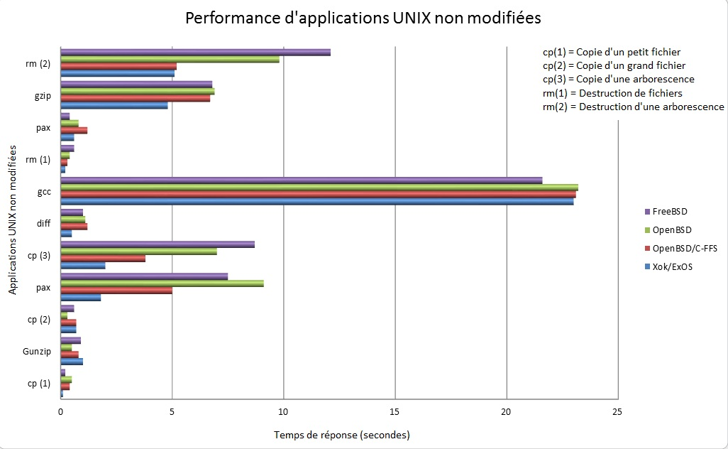 Perf-UNIX-final